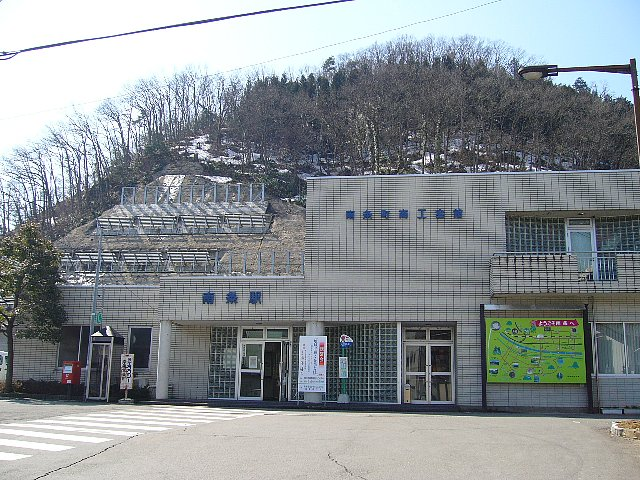 北陸本線 南条駅 駅舎 2006年3月 Bakkai撮影